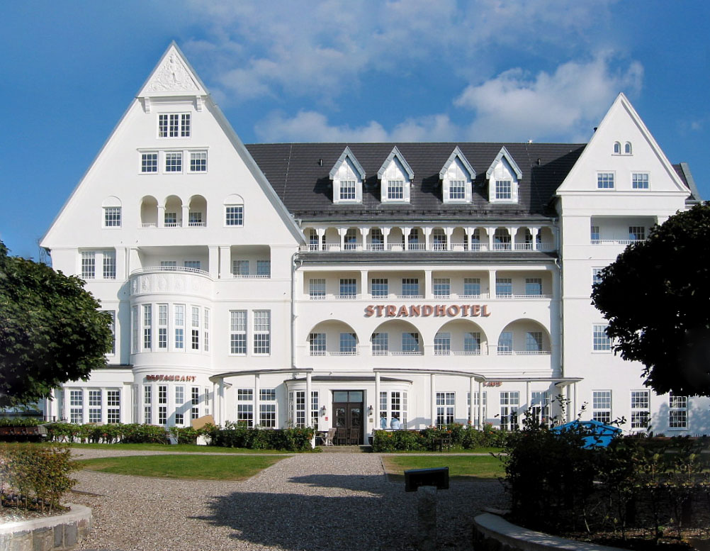 das Strandhotel an der Glücksburger Kurpromenade